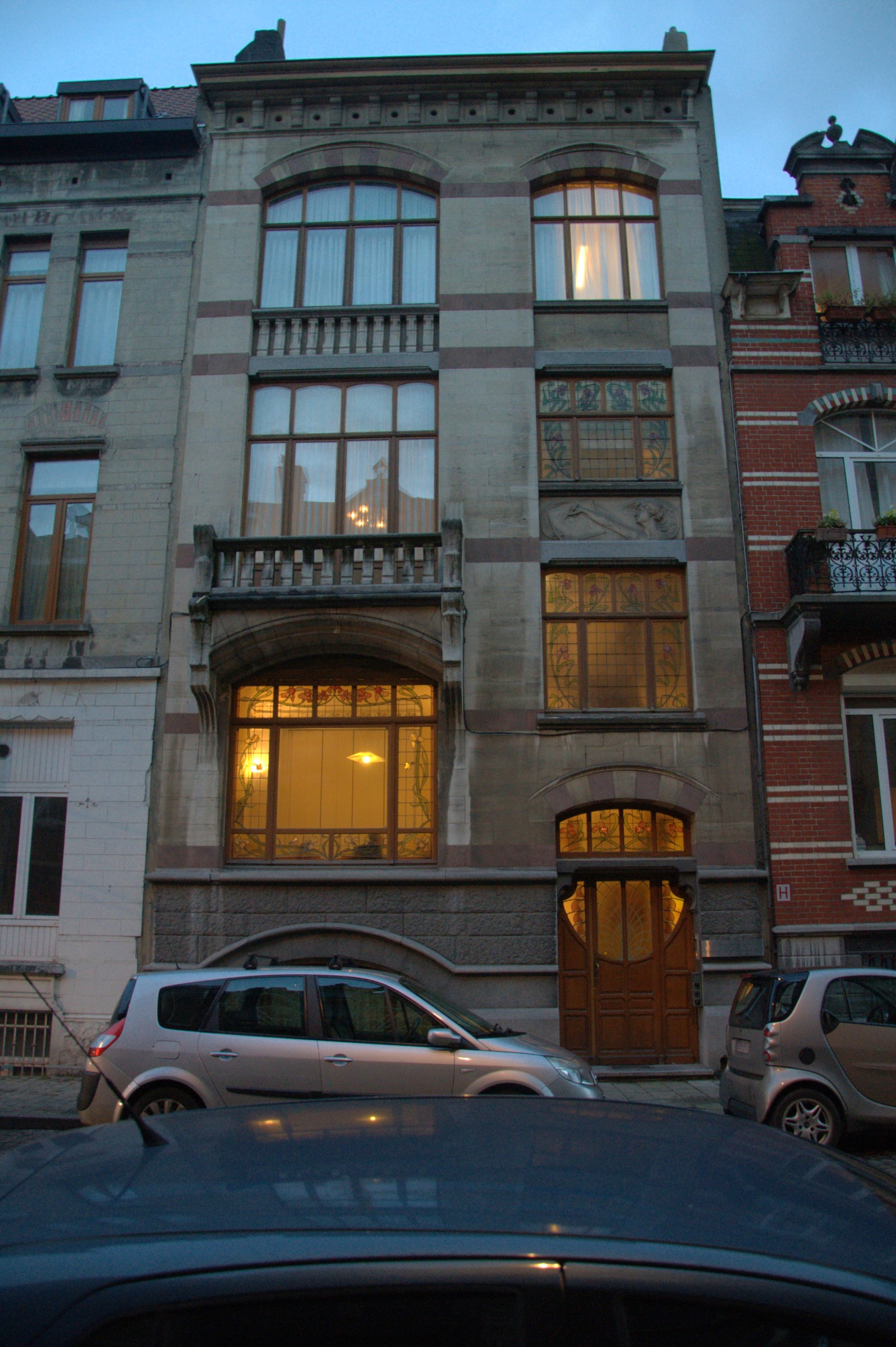 Patrimoine immobilier de bruxelles